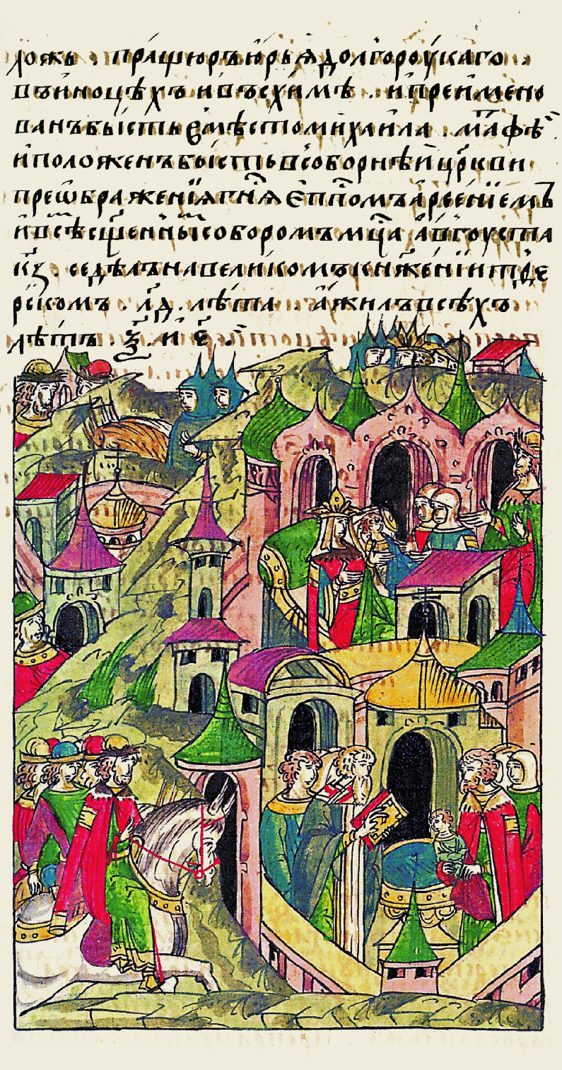 Этот благородный и христолюбивый великий князь Михаил родился от великого князя Алек- сандра Михайловича и матери Анастасии в Пскове. Тогда его отец великий князь Александр Михайло- вич после убийства Щелкана Дюденивича, племянника Ордынско- го царя Азбяка, не мог жить в Твери, опасаясь насилия и притеснения от татар, и родился там его сын князь Миха- ил, в то время как он жил в большой скорби, и крестил его владыка Василий, архиепи- скоп Новгородский, в 6841 году. Прожил же великий князь Алек- сандр 13 лет в Пскове